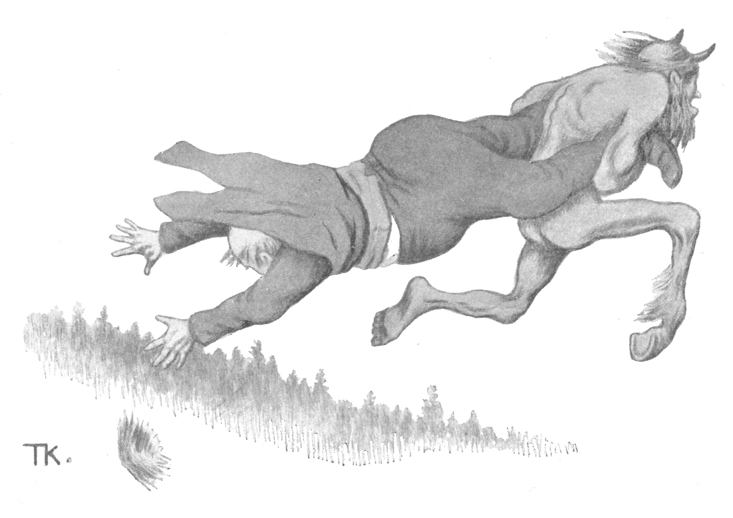 Illustrasjon til folkeeventyret Fanden og futen Scanned illustration from 1936 edition of Asbjørnsen & Moe: Samlede eventyr. Norske kunstneres billedutgave. Gyldendal Norsk forlag.